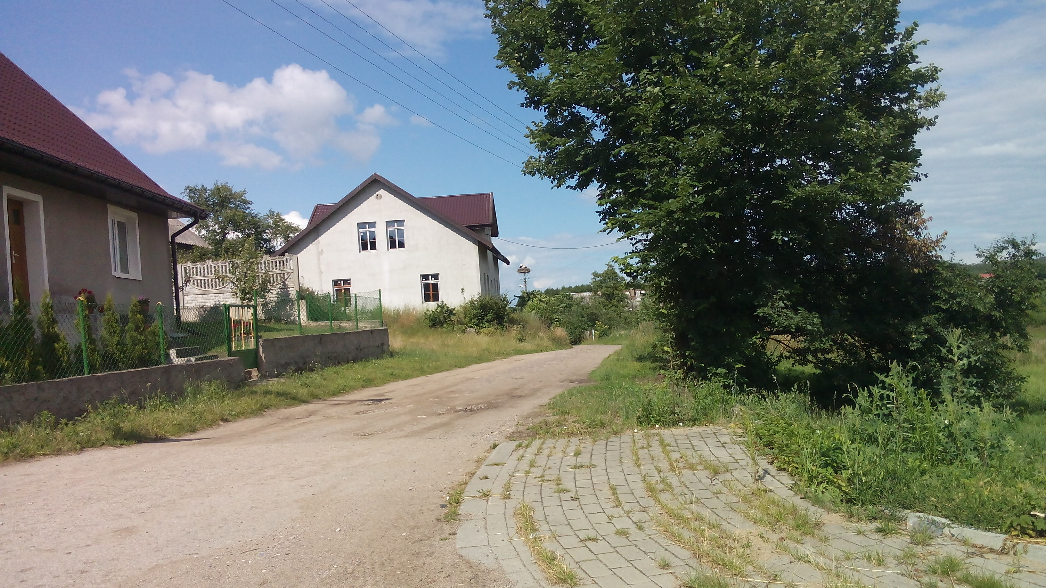 Gniazdo bociana białego znajdujące się we wsi Kożuchy